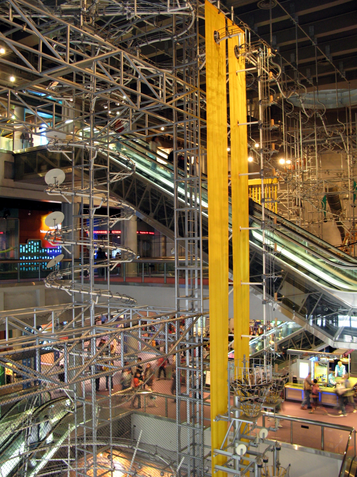 Hong Kong Science Museum Energy Machine